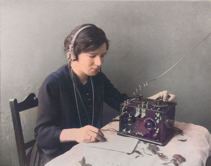 une femme, Florence Violet McKenzie, assise à un bureau en écoutant une des premières radios en 1922. La radiodiffusion, qui a commencé au moment où cette photo a été prise, a fait exploser l'écoute de la radio, un passe-temps extrêmement populaire, pendant les années folles. Il s'agit d'un ensemble de faible puissance utilisant un tube à vide à triode unique pour amplifier le signal, indiqué par le trou dans le panneau avant, utilisé pour vérifier si le filament était toujours rougeoyant. De petits ensembles comme celui-ci n'avaient pas assez de puissance pour piloter un haut-parleur et devaient donc être écoutés avec des écouteurs. Le cadran de réglage n'était pas calibré en kHz ou MHz comme les radios modernes, donc les stations de radio devaient être trouvées par essais et erreurs. Lorsqu'une station de radio a été trouvée, le numéro sur le cadran a été noté au fur et à mesure que cette femme le fait, afin qu'il puisse être retrouvé. Le fil supérieur va à une antenne long fil.